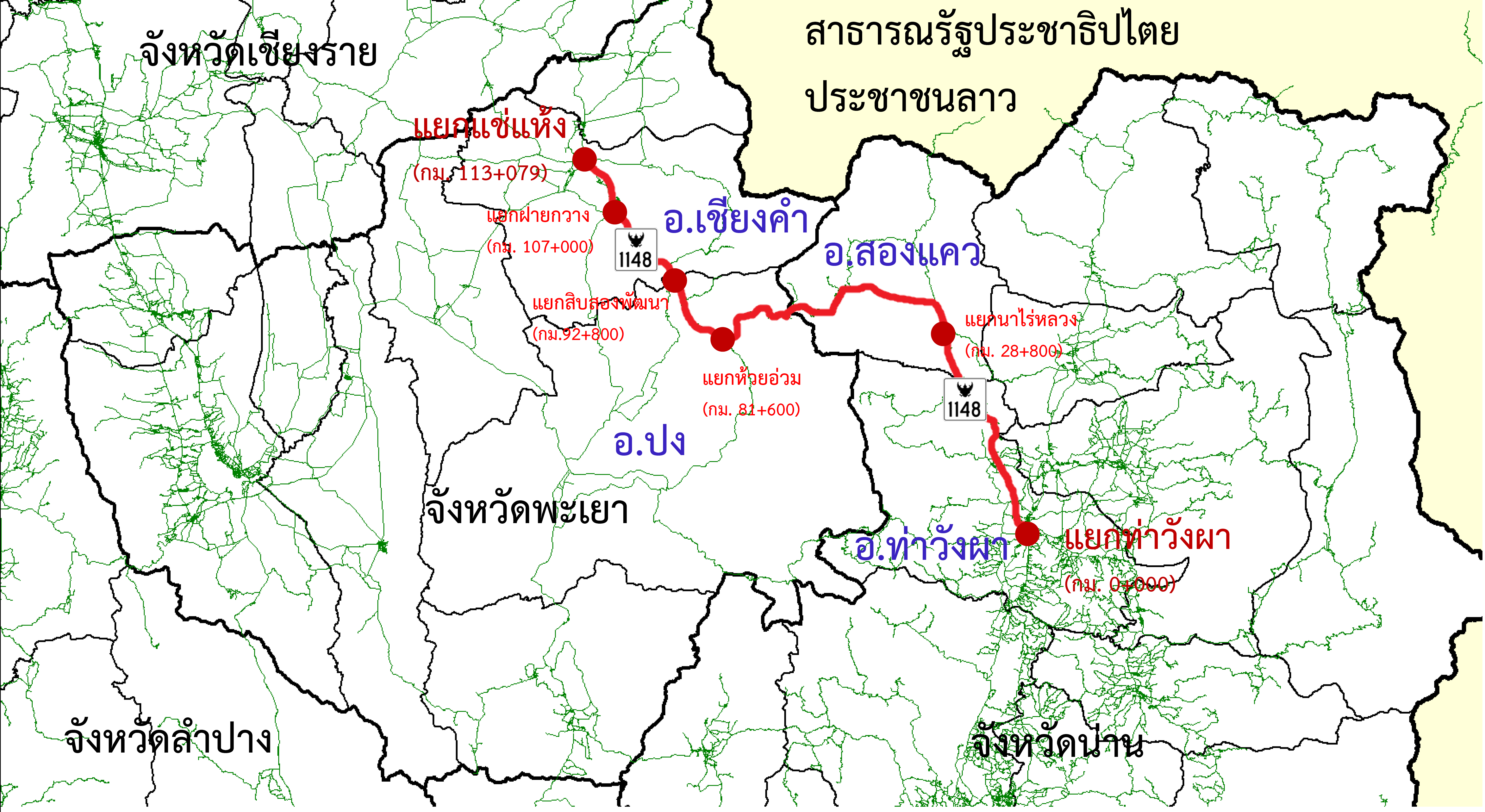 TH HW 1148 map